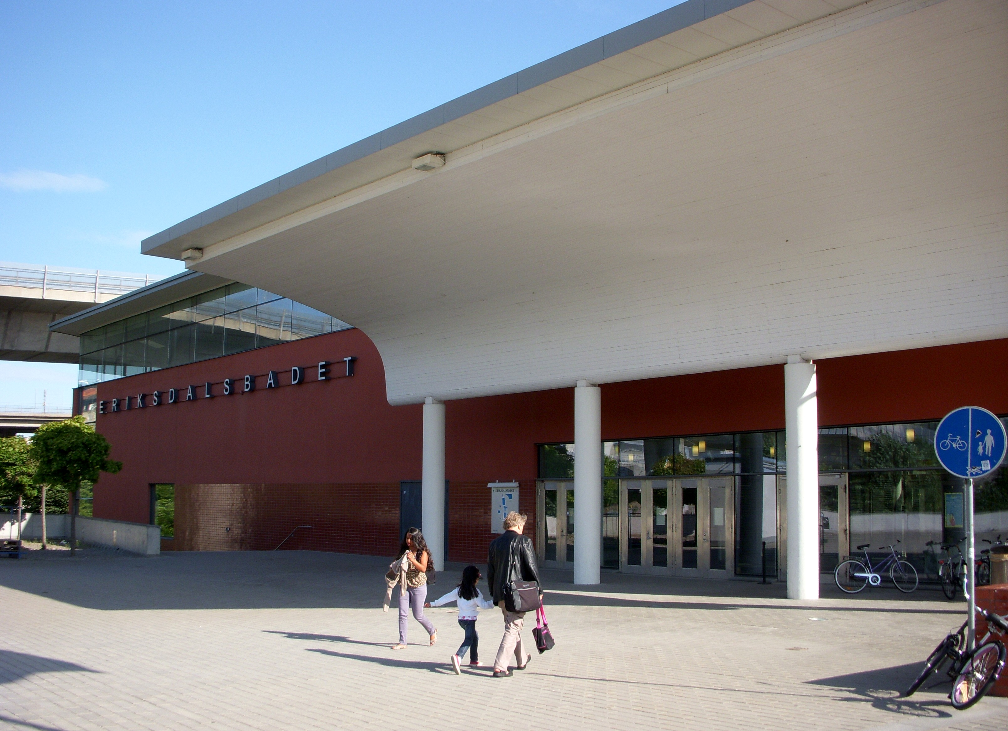 Eriksdalsbadet på Södermalm i Stockholm